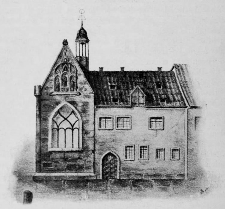 Zeichnung des 1827 abgerissenen Magdalenenstifts im Schüsselkorbe, Domhof 21 in Hildesheim